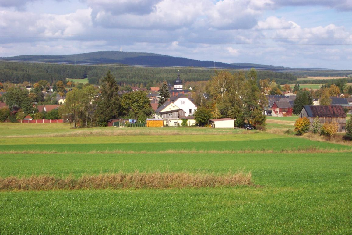 Die Marktleuthener "Altstadt" mit dem Großen Kornberg im Hintergrund